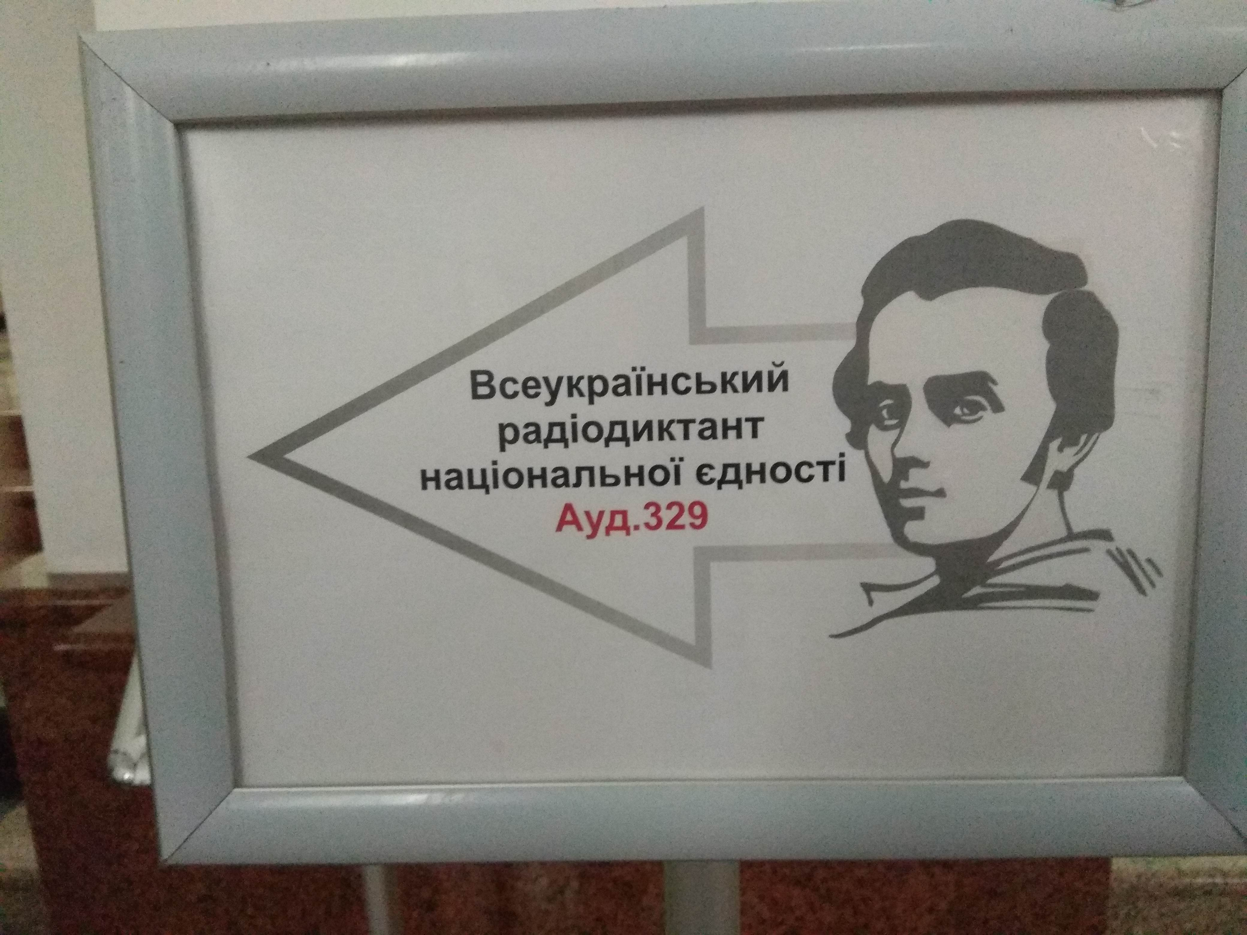 Радіодиктант національної єдності — вказівник у КНУ імені Т. Шевченка (9 листопада 2017)